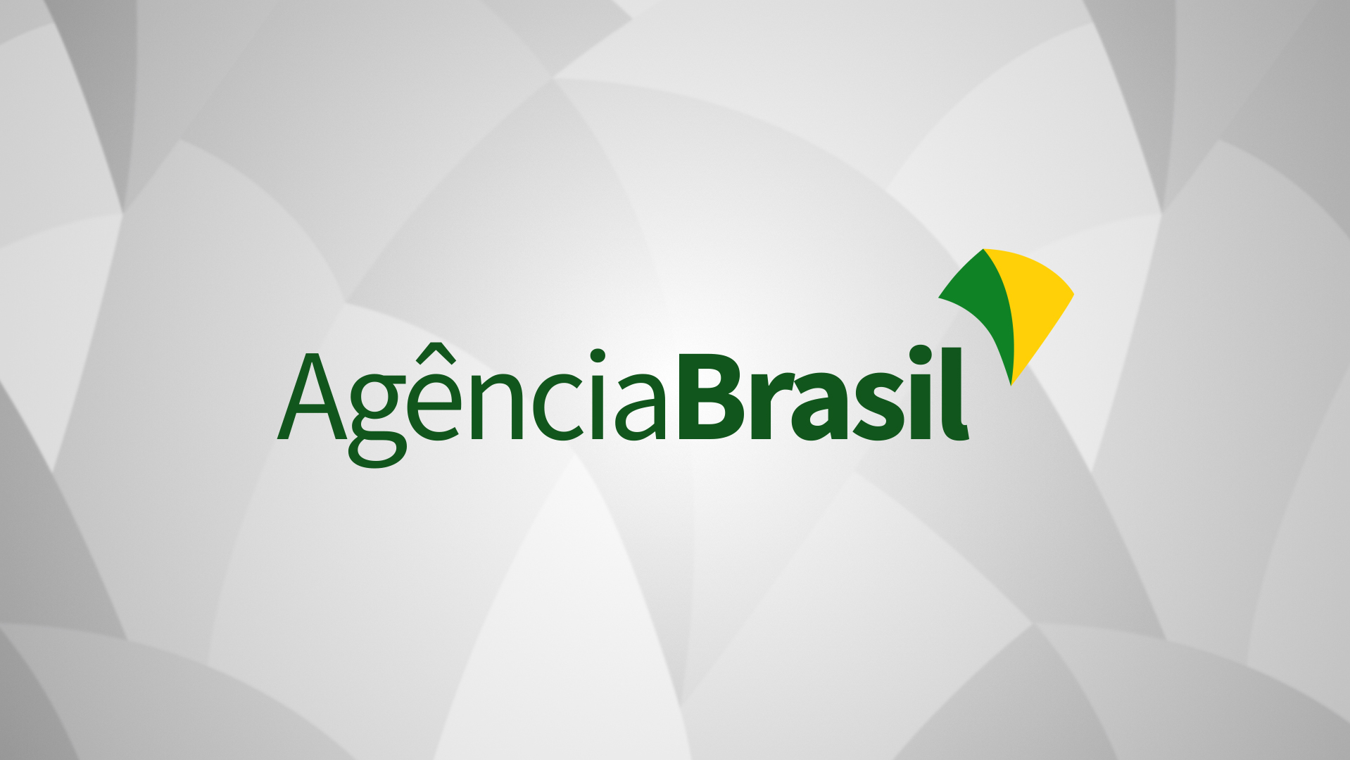 Logomarca oficial Agência Brasil 2020